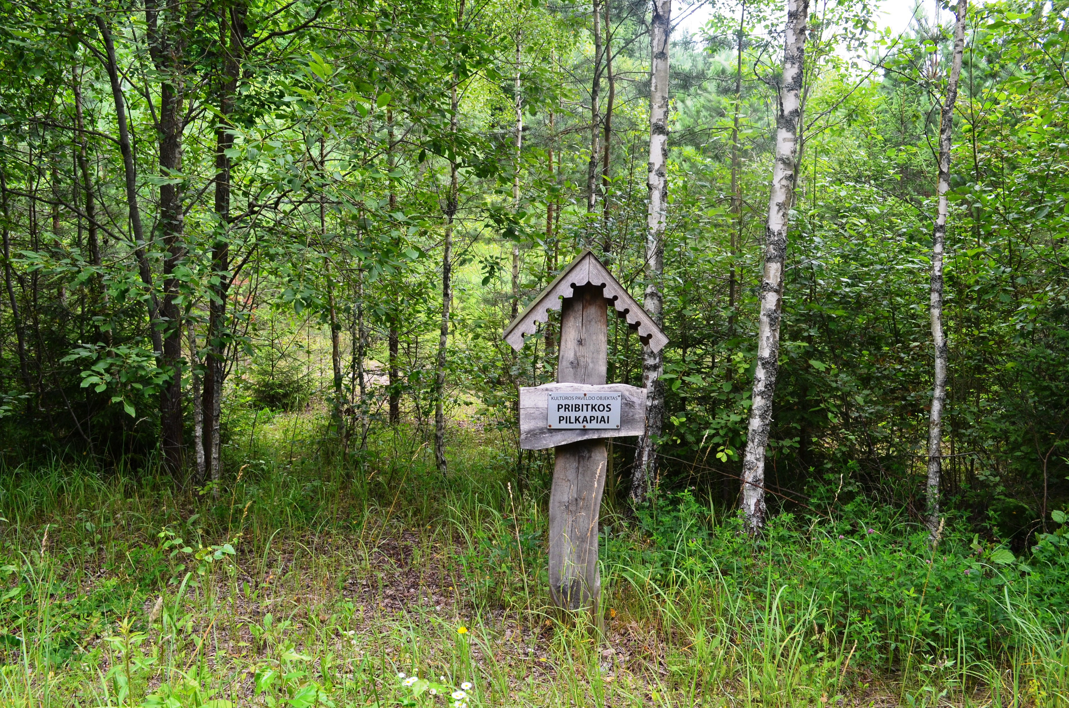 Pribitkos pilkapiai, Rietavo sav. Žemaitėška: Pribitkas pėlkapē, Rėitava sav.